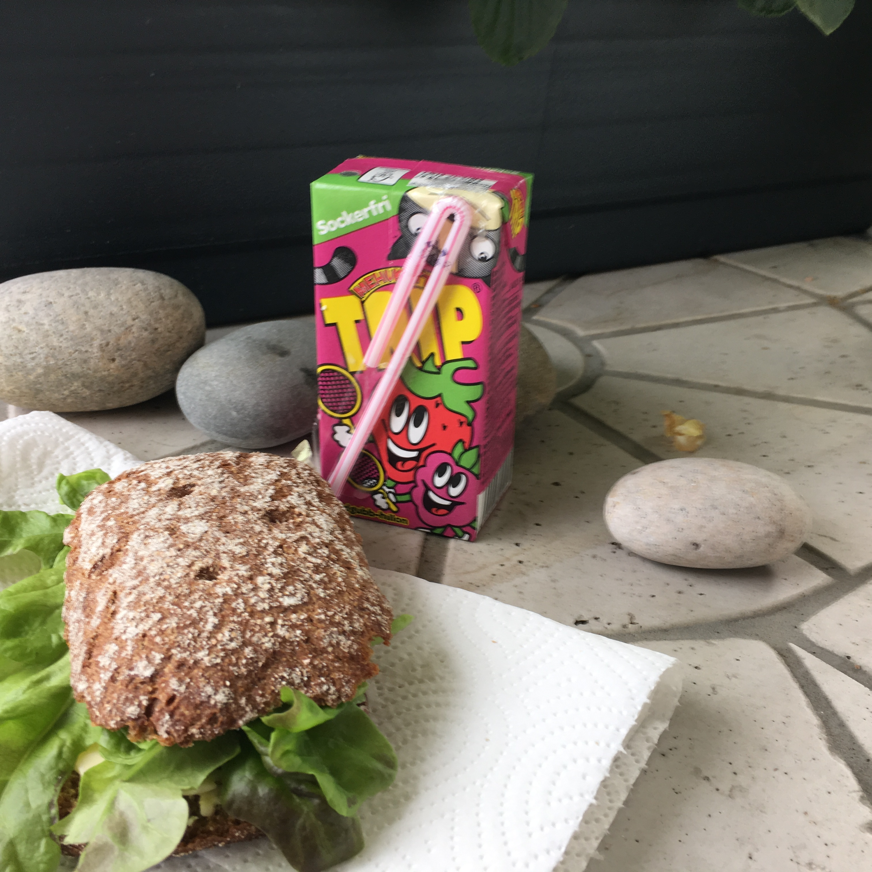 Retkievääksi trip juoma